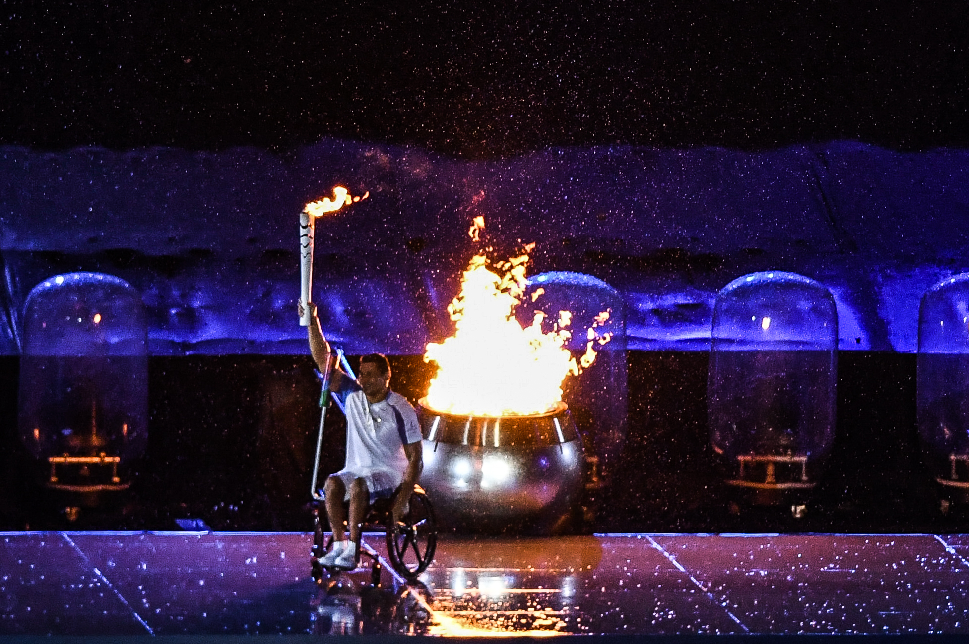 Rio de Janeiro - Cerimônia de abertura dos Jogos Paralmpicos Rio 2016 no Estdio do Maracanã (Tomaz Silva/Agência Brasil)